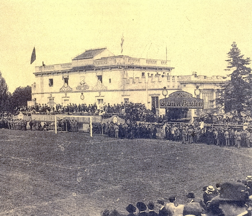 Camp de La Manigua posteriorment l'Estadi de Sarrià